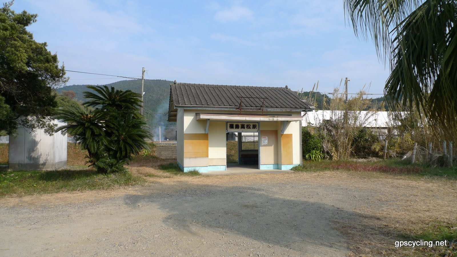 福島高松駅